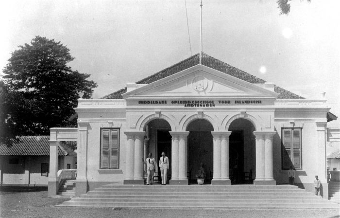 Repronegatief. Op deze foto staat het gebouw van de Middelbare Opleidingsschool voor Inlandse Ambtenaren (MOSVIA) in Bandoeng. Eerder was in dit gebouw de Hogere Kweekschool (HKS) gevestigd. (R. Jongmans, 2008). Middelbare Opleidingsschool voor Inlandsche Ambtenaren (MOSVIA) in Bandoeng